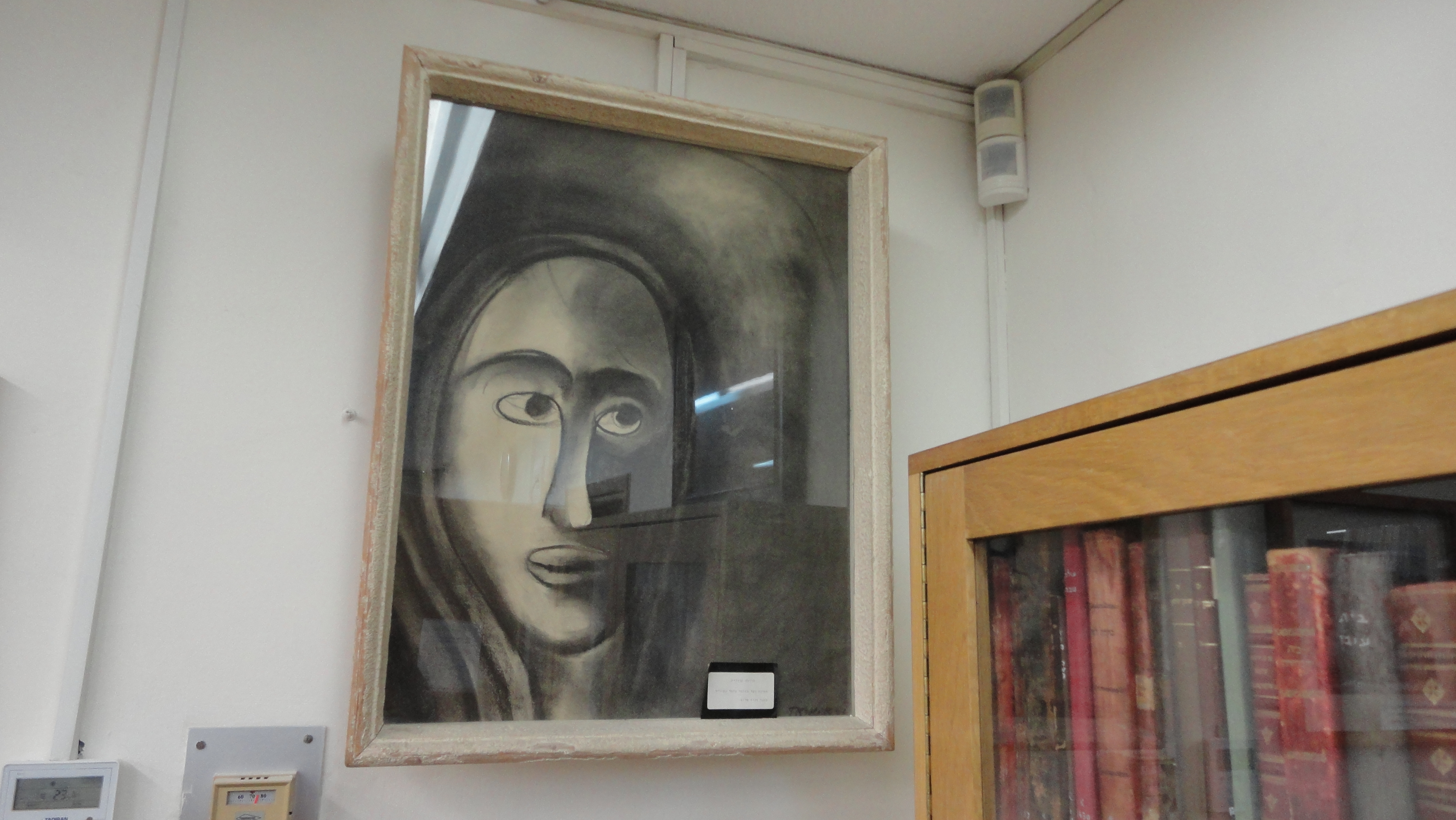 Drawing